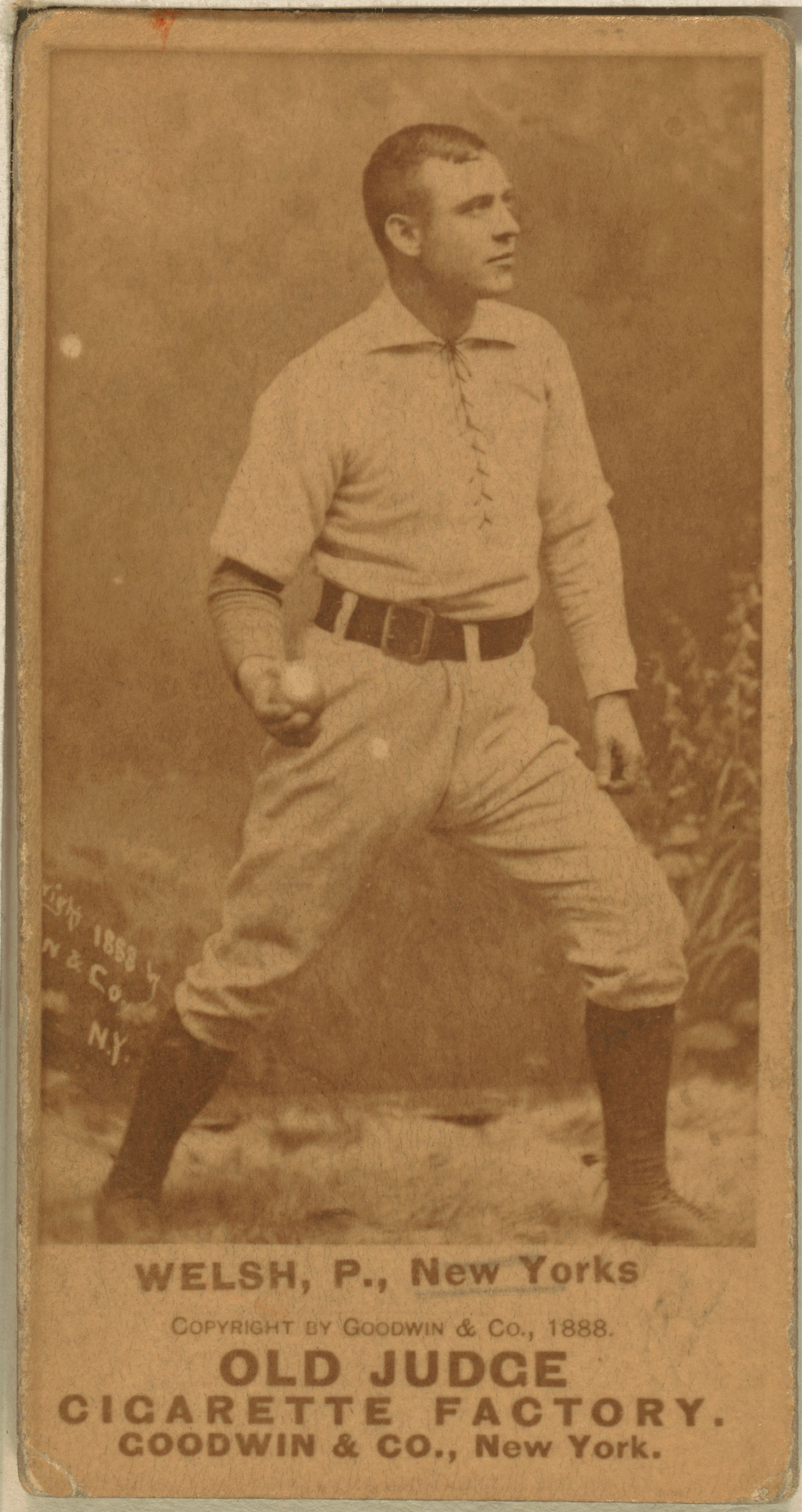 Mickey Welch